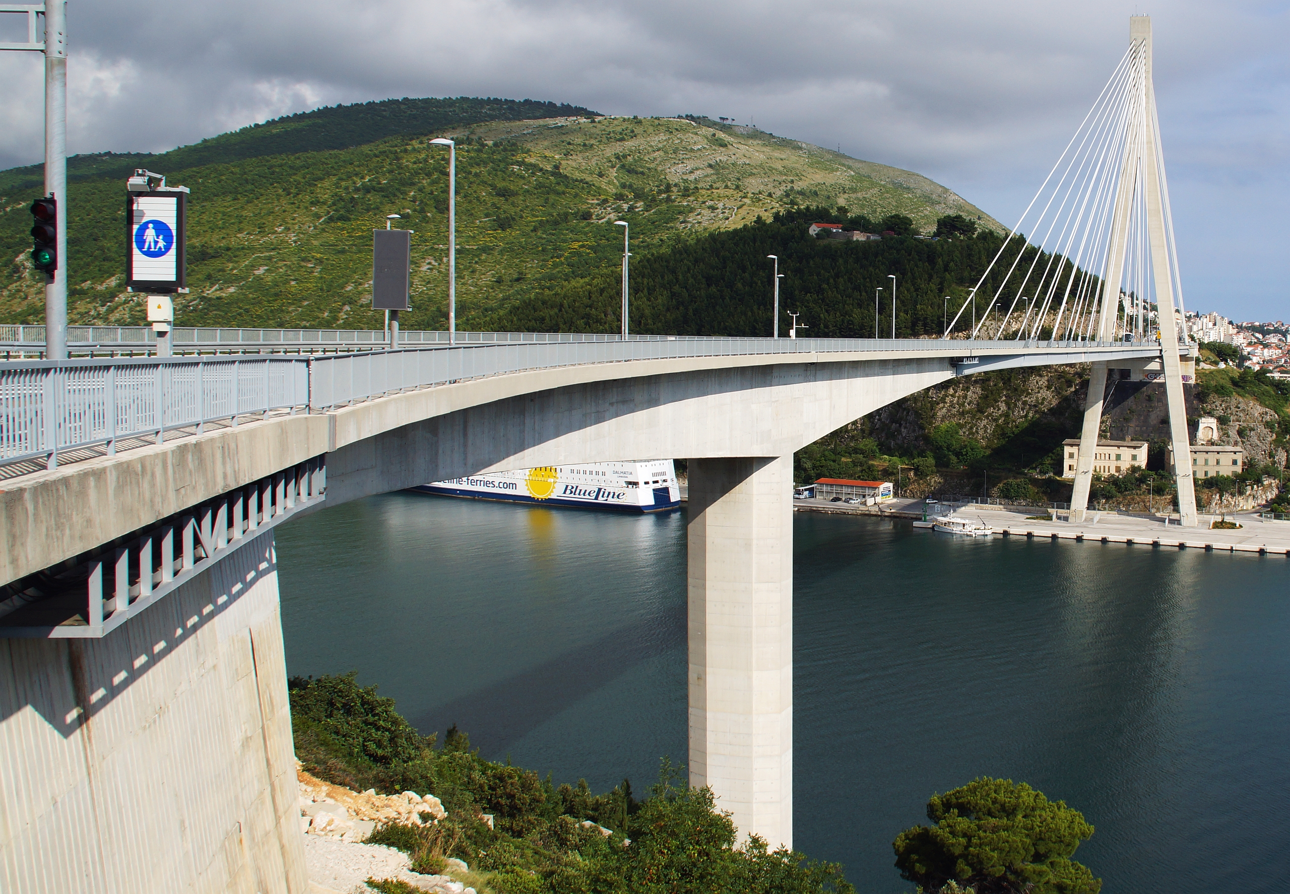 Most dr. Franja Tudmana 2001 Franjo-Tudman-Brücke Westseite Schrägseilbrücke über Adria-Bucht Ombla Dubrovnik Kroatien - Foto Wolfgang Pehlemann DSC04570